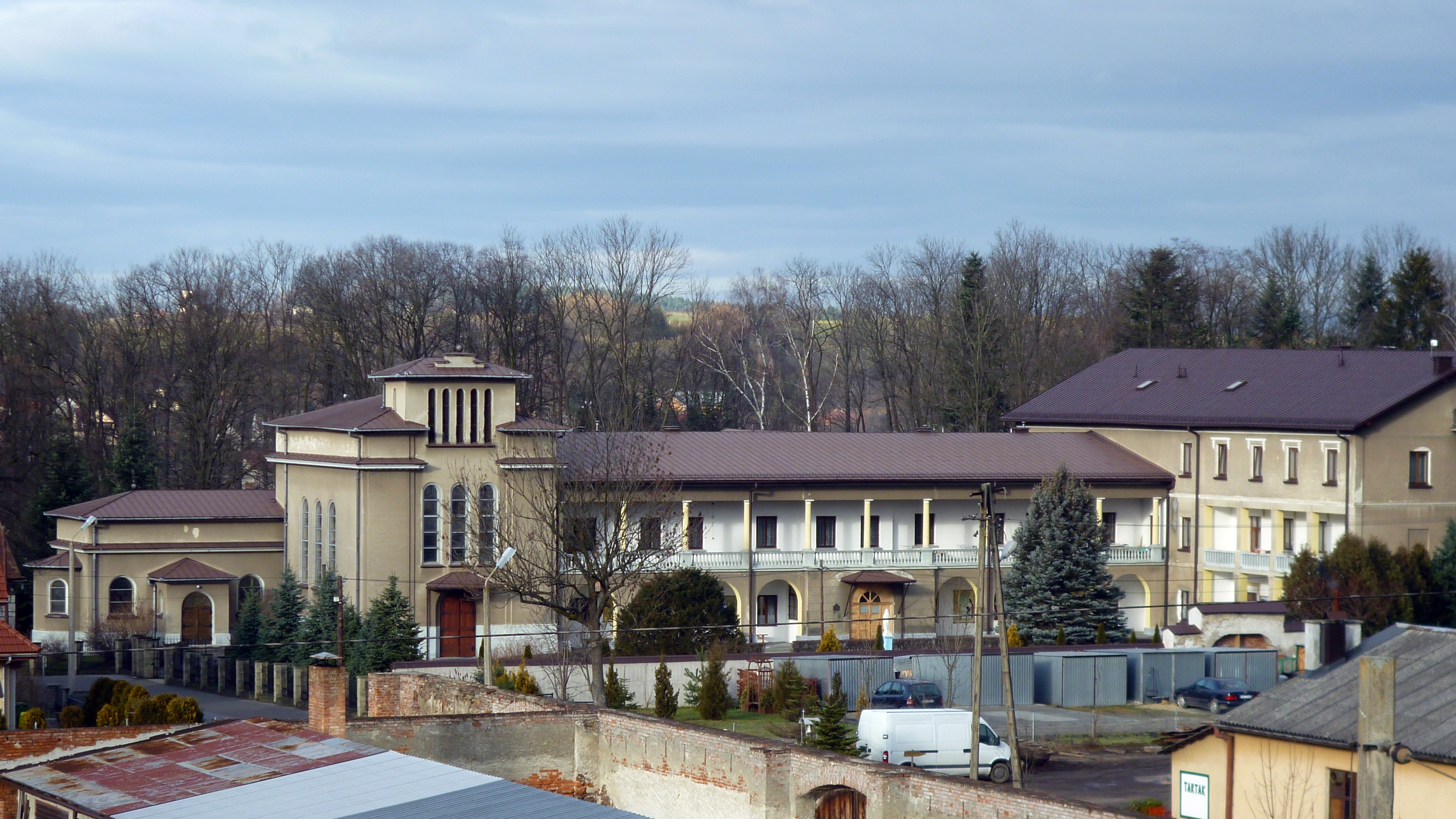 Biała Niżna klasztor Zgromadzenia Sióstr św. Dominika założony w roku 1895